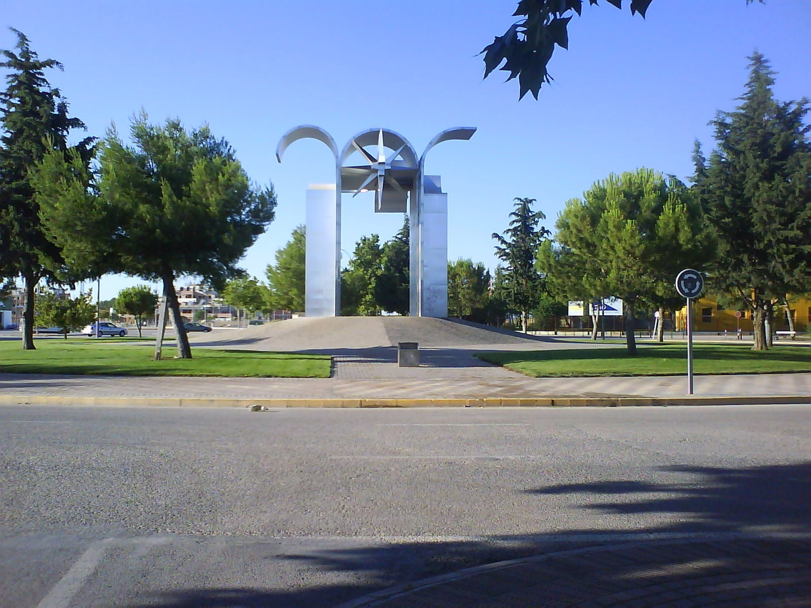 Rotonda del Pórtico de La Mancha, en las inmediaciones del Campus Universitario de la ciudad de Albacete